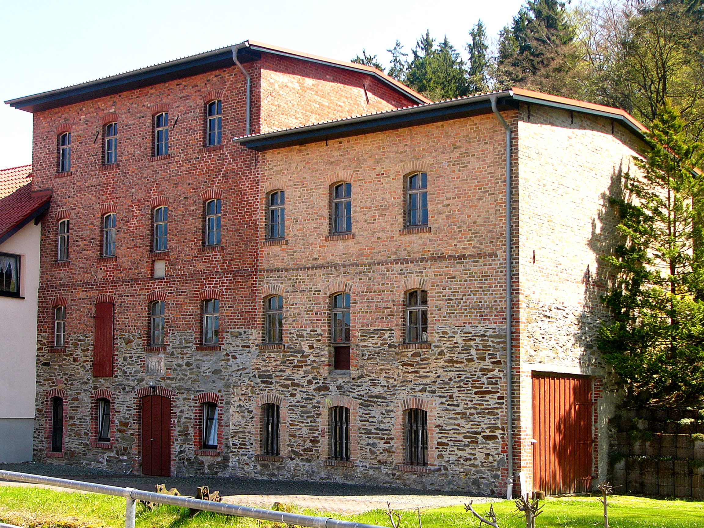 Wassermühle 1713, dazugehöriges Wohnhaus um 1900 umgebaut; Denkmalnr.: 094 84974.